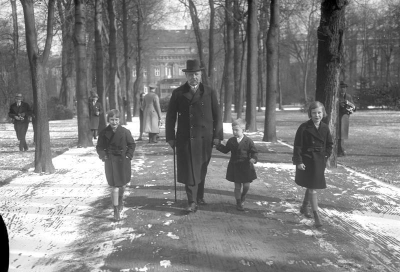 Erste Aufnahme des Reichspräsidenten von Hindenburg mit seinen Enkelkindern bei einem Mittags-Spaziergang im Park seines Palais in der Wilhelmstrasse in Berlin ! Der 84 jährige Reichspräsident von Hindenburg mit seinen Enkelkindern im Garten seines Palais.